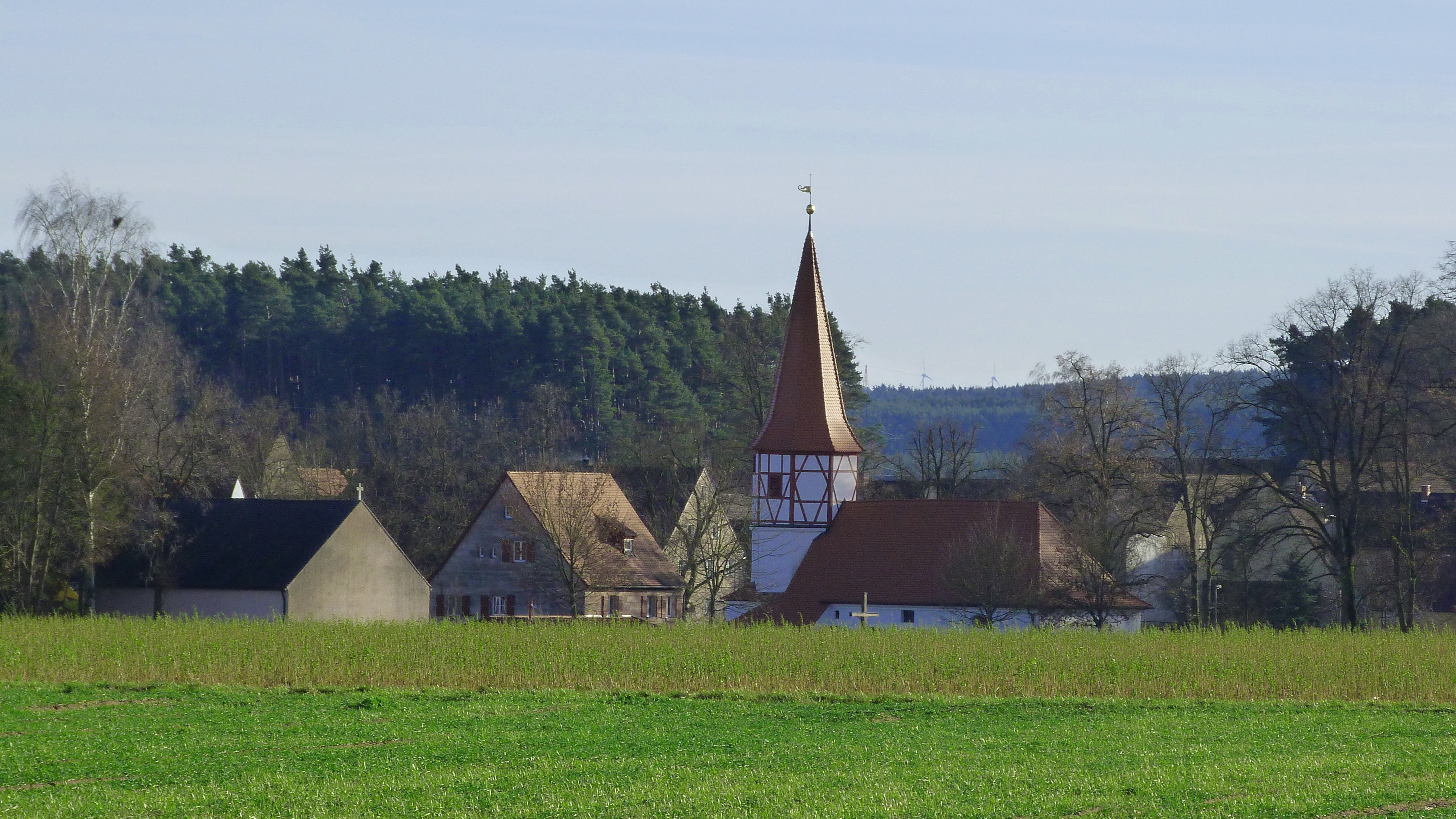 Kirche